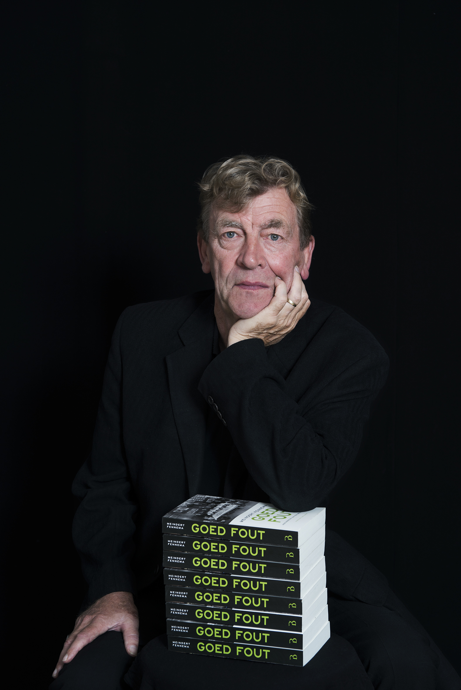 Meindert Fennema